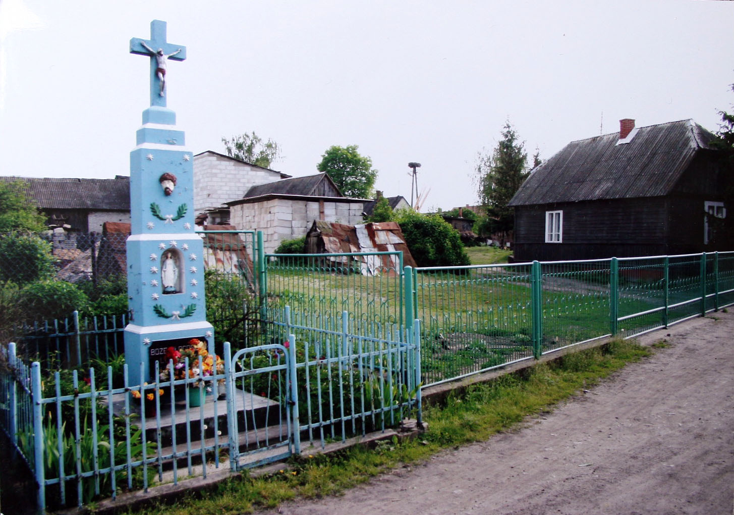 Kapliczka we wsi Skoki w powiecie puławskim zbudowana w 1945 z inicjatywy Władysława Wójtowicza